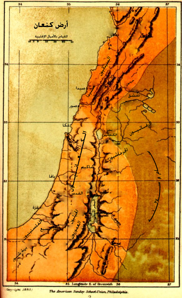 خريطة تاريخية تعود لعام 1880، تبيّن تواجد الكنعانيين في فلسطين القديمة